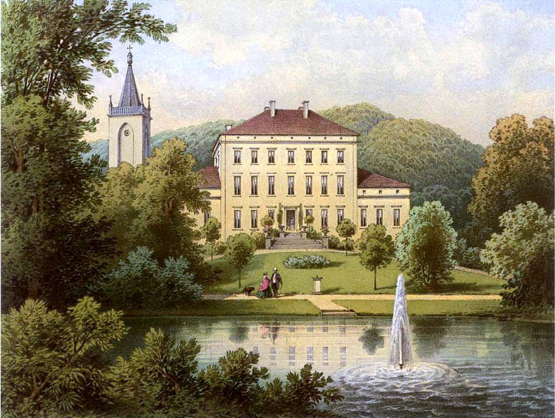 Schloss Hohenliebenthal, Kreis Schönau, Lithografie aus dem 19. Jahrhundert